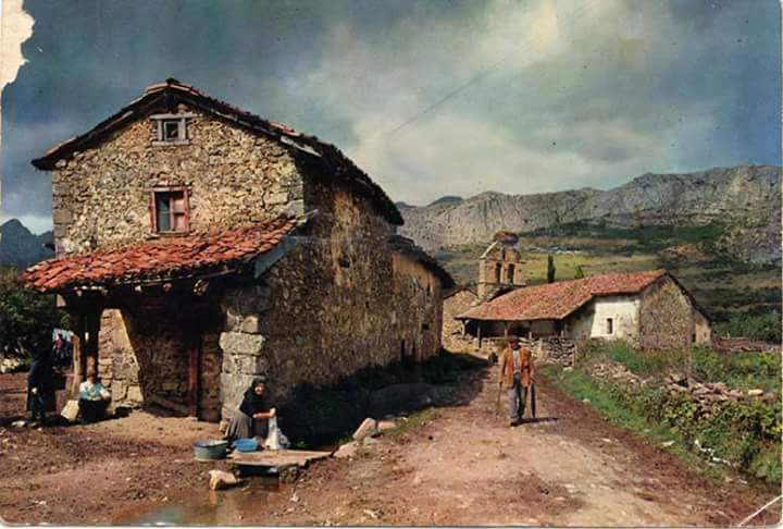 La Puerta y sus gentes en 1960 fotografiados por un turista hospedado en el Parador